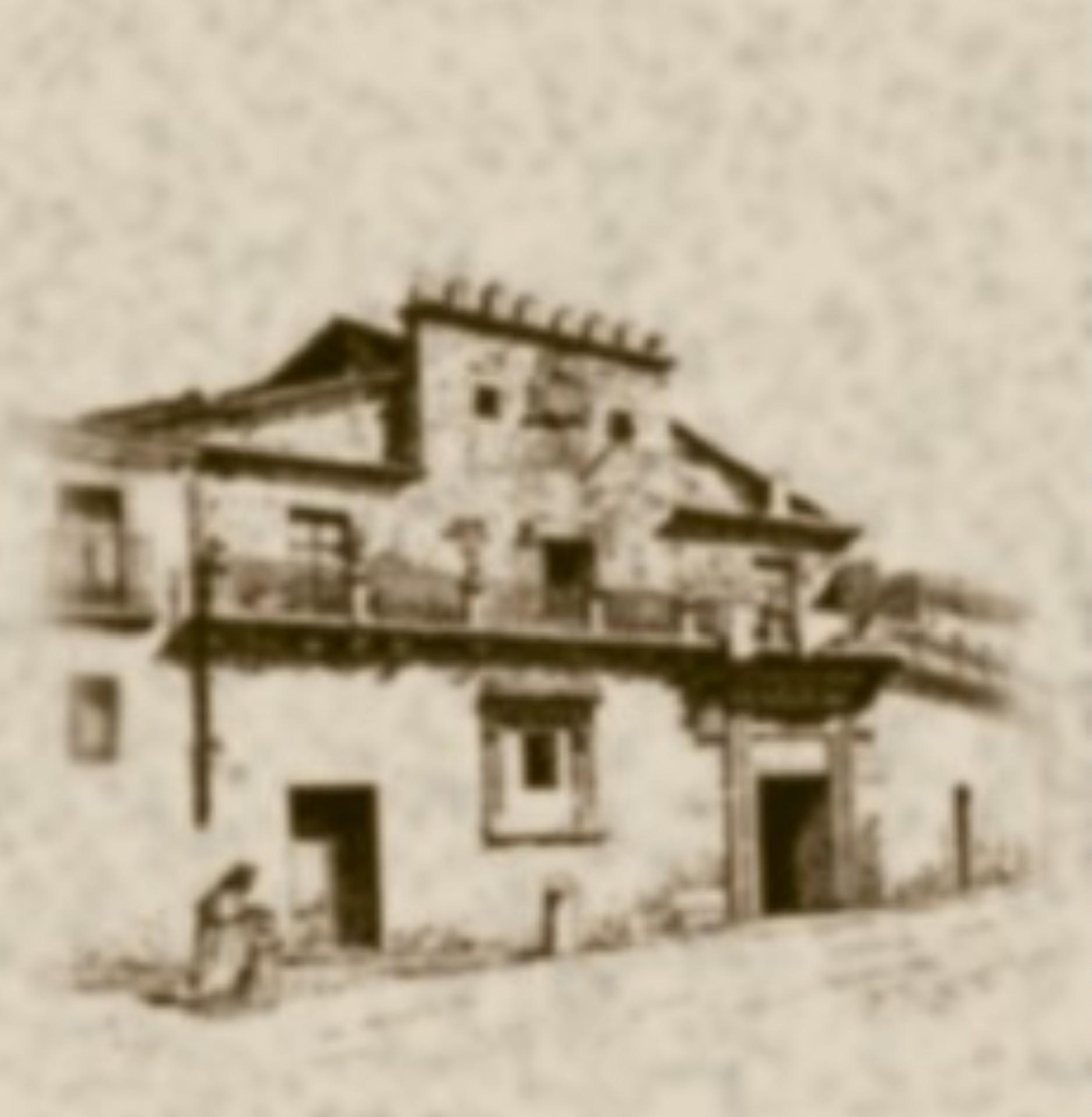 Palacio viejo de los Condes de Gomara